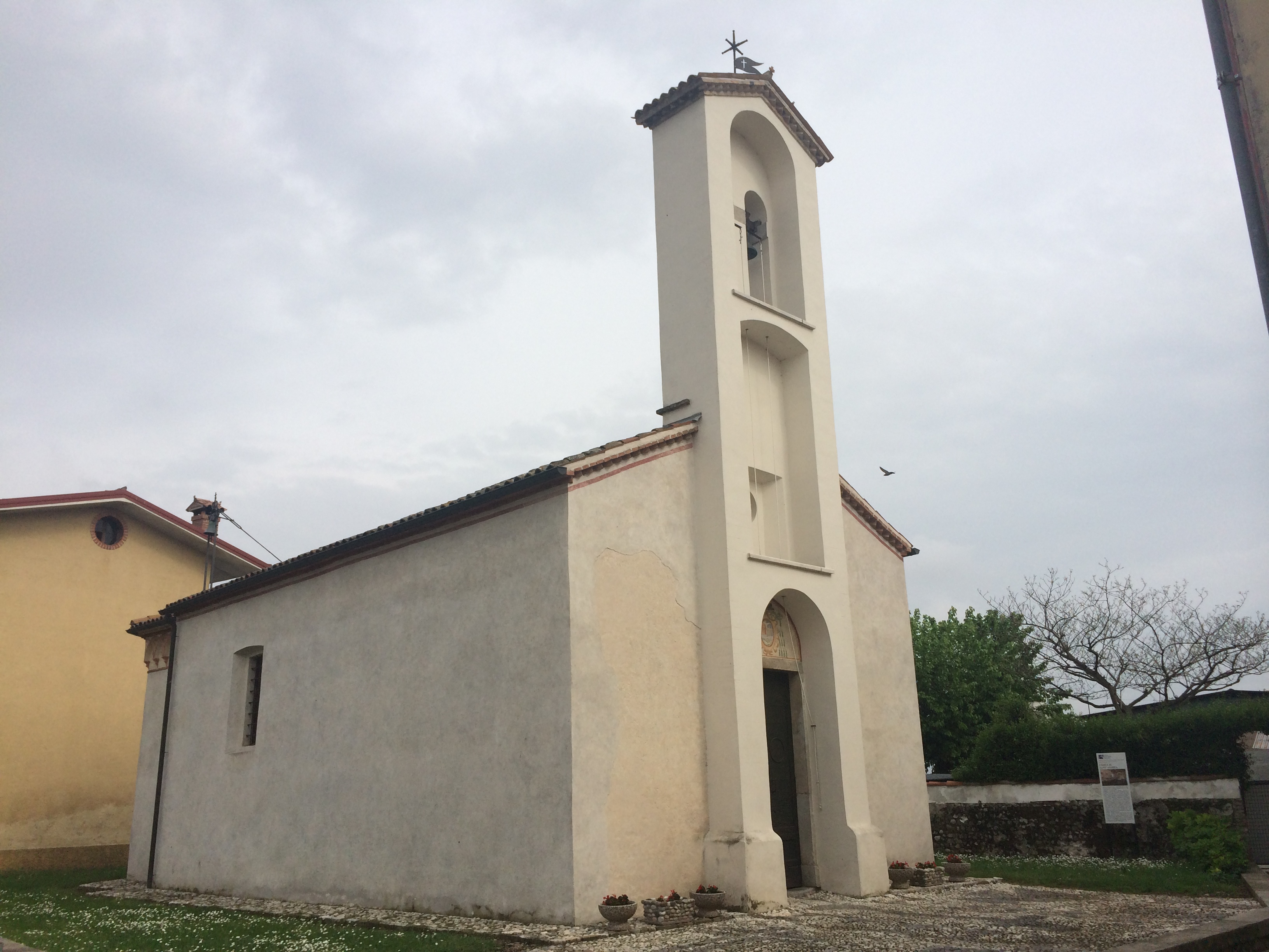 Bicinicco - Gris - ChiesaSantAndrea02